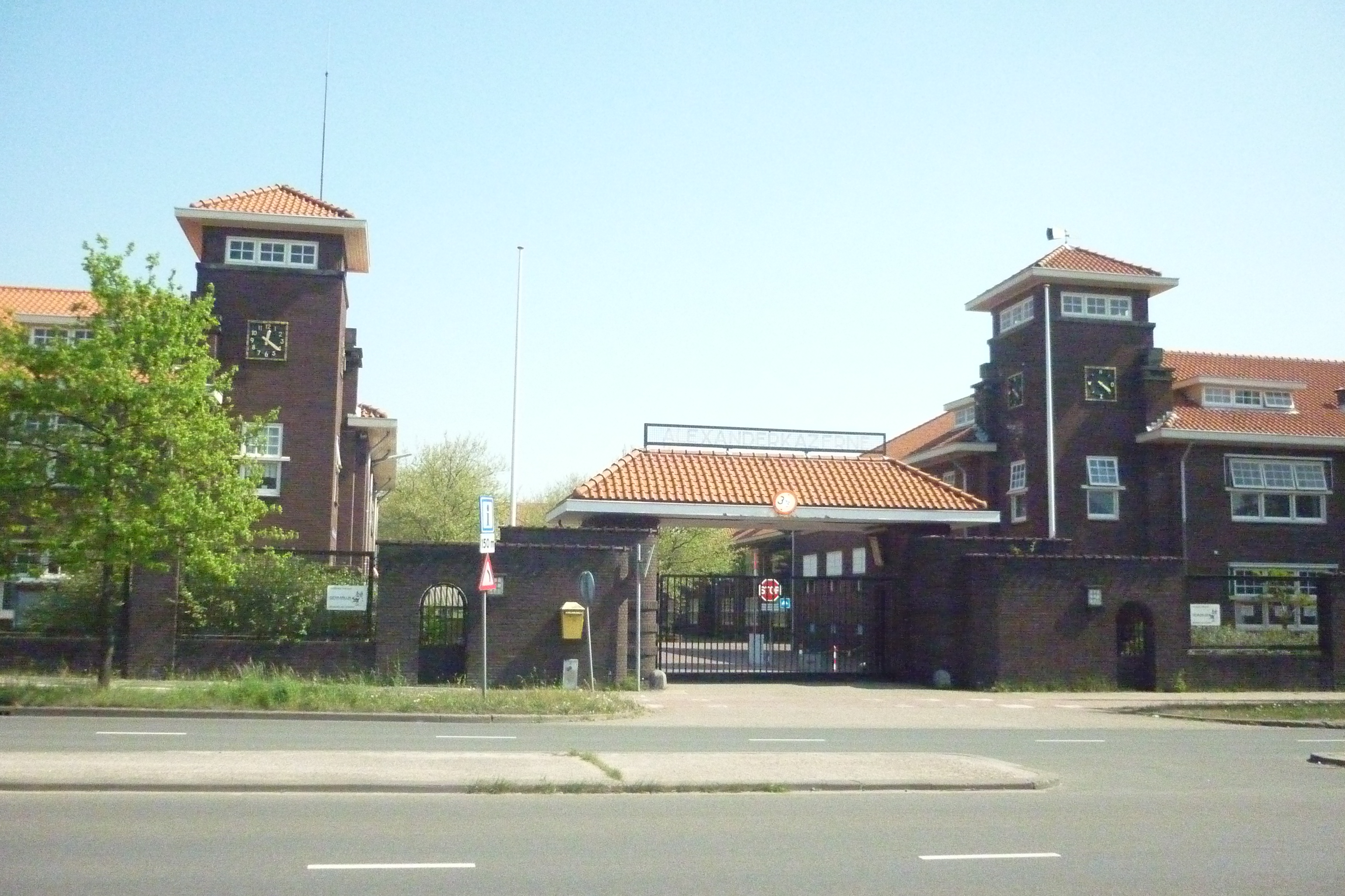 Alexanderkazerne aan de Van Alkemadelaan in Den Haag